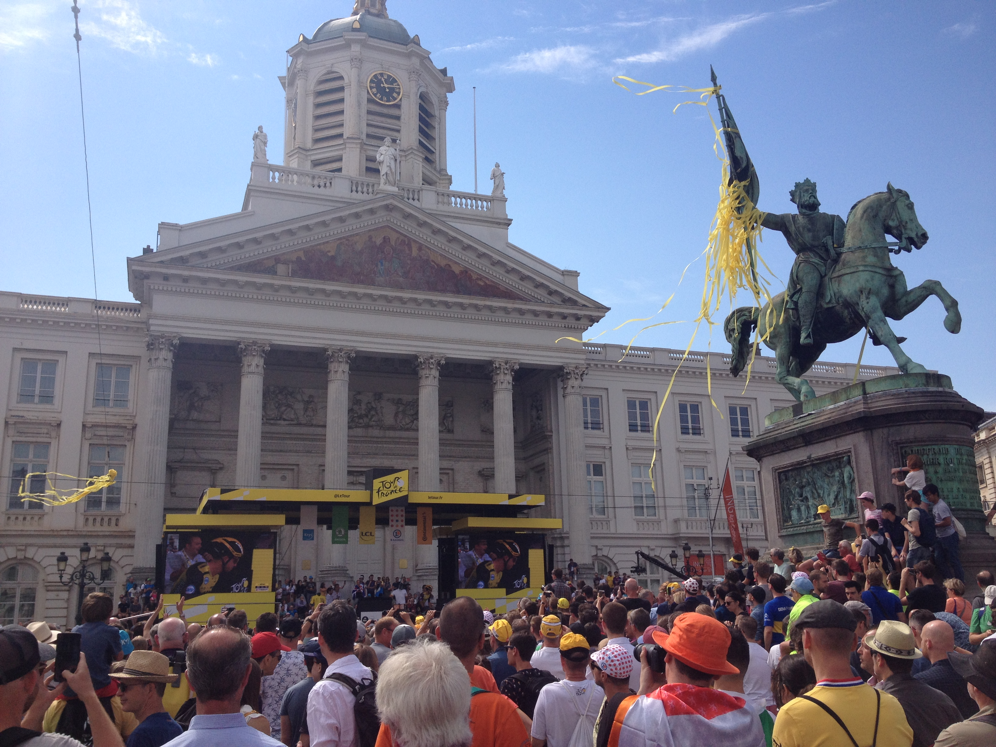 Grand Départ van de Tour de France in Brussel op zaterdag 6 juli 2019